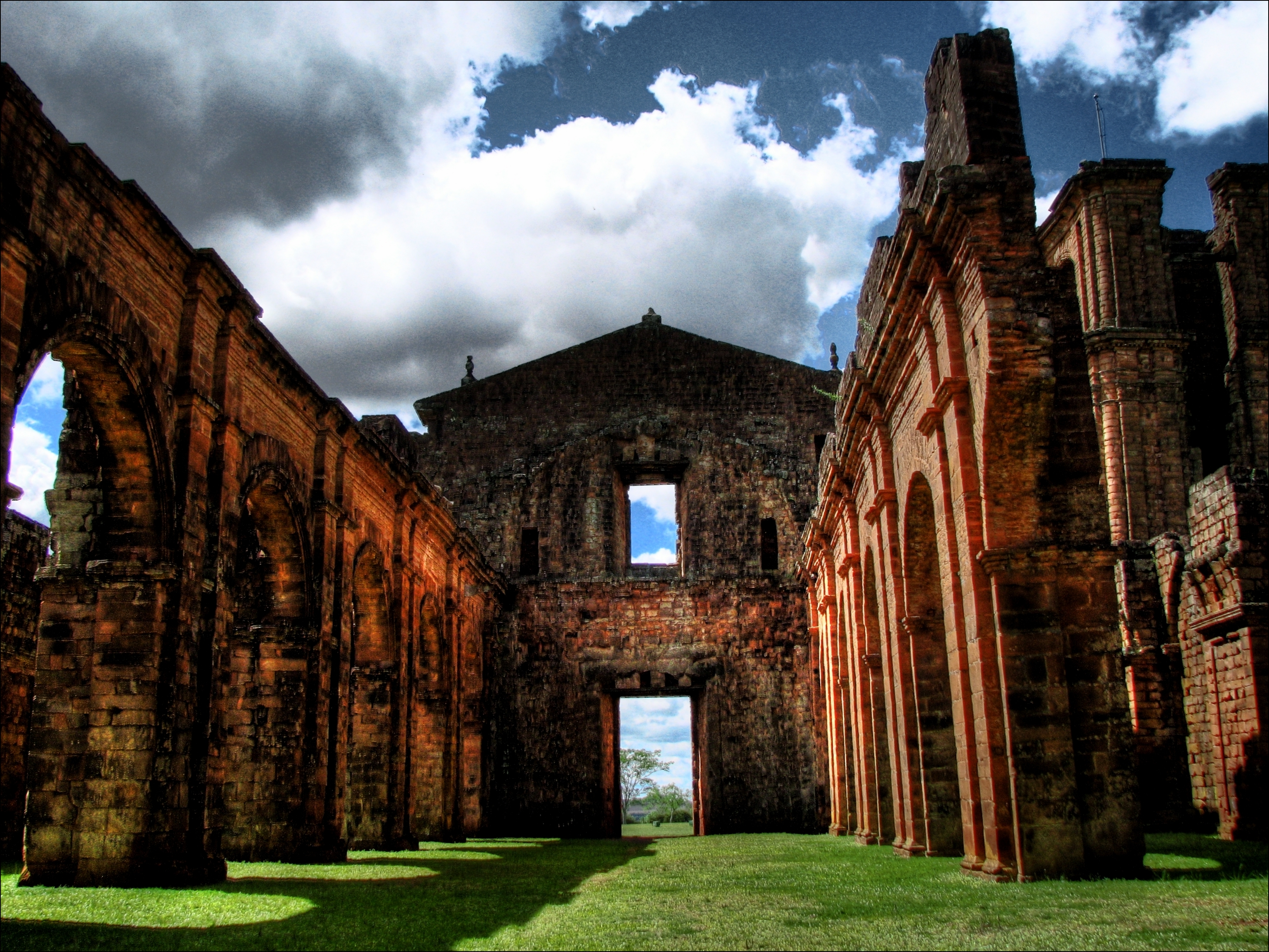 Catedral de São Miguel Arcanjo das Missões. Construída por índios guarani e jesuítas no século XVII e, posteriormente, destruída por tropas portuguesas e espanholas.